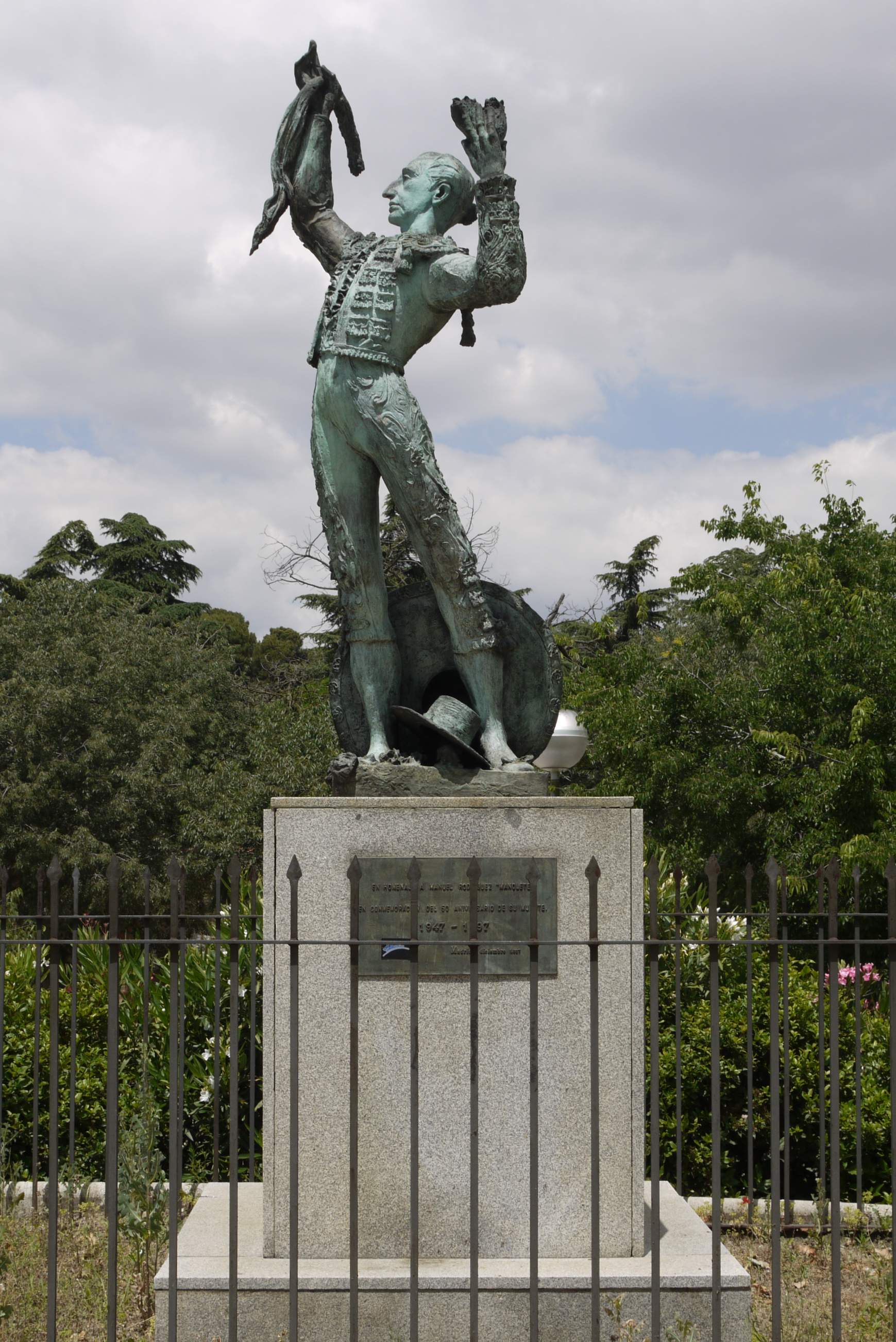 Manuel Laureano Rodríguez Sánchez, más conocido como Manolete. Torre Arias, Madrid, España